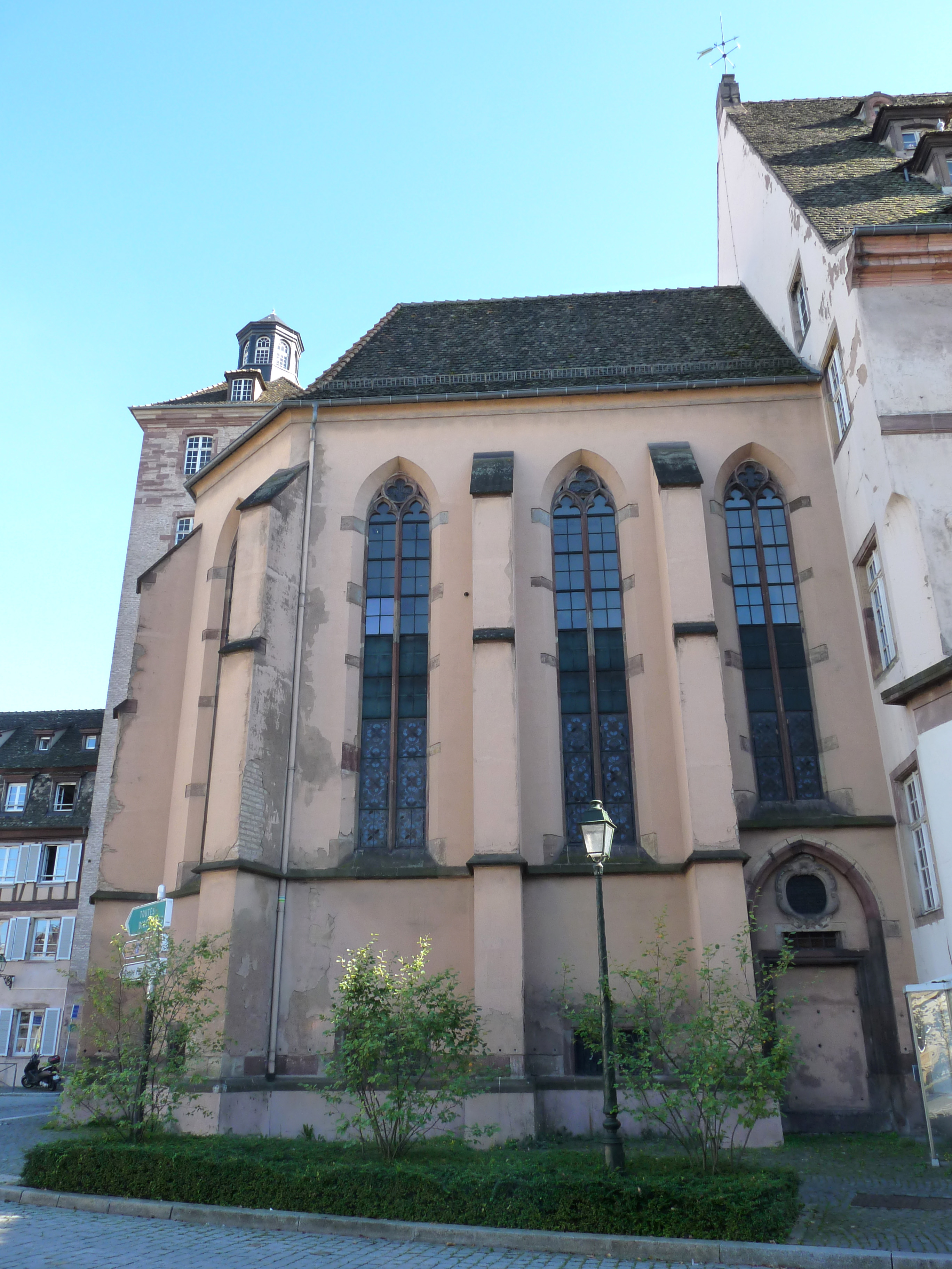 Chœur polygonal de la chapelle Saint-Erhard de l'Hôpital Civil de Strasbourg. XVe siècle